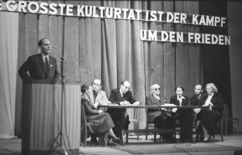 ADN-ZB-Illus-Kümpfel-26.10.1950 Friedenskundgebung der Berliner Kulturschaffenden Am 26.10.1950 fand im Schiffbauerdamm-Theater in Berlin eine Friedenskundgebung der Berliner Kulturschaffenden statt, auf der Professor Havemann sprach. UBz: Blick auf das Präsidium. v.l.n.r.: Prof. Havemann (am Rednerpult), Helene Weigel, Herr Pitra vom Metropol-Theater, Prof. Knepler, Ernst Legal, Gerda Müller und ganz rechts Hedda Zinner.